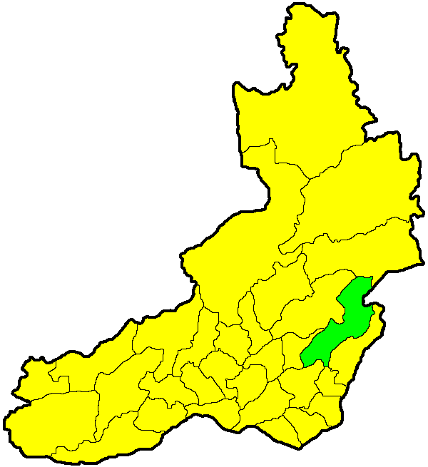 Газимуро-Заводский район на карте Забайкальского края